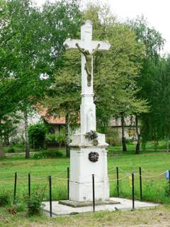 A felsőnyéki faluhatárban álló kőkereszt (Tolna megye, Magyarország)